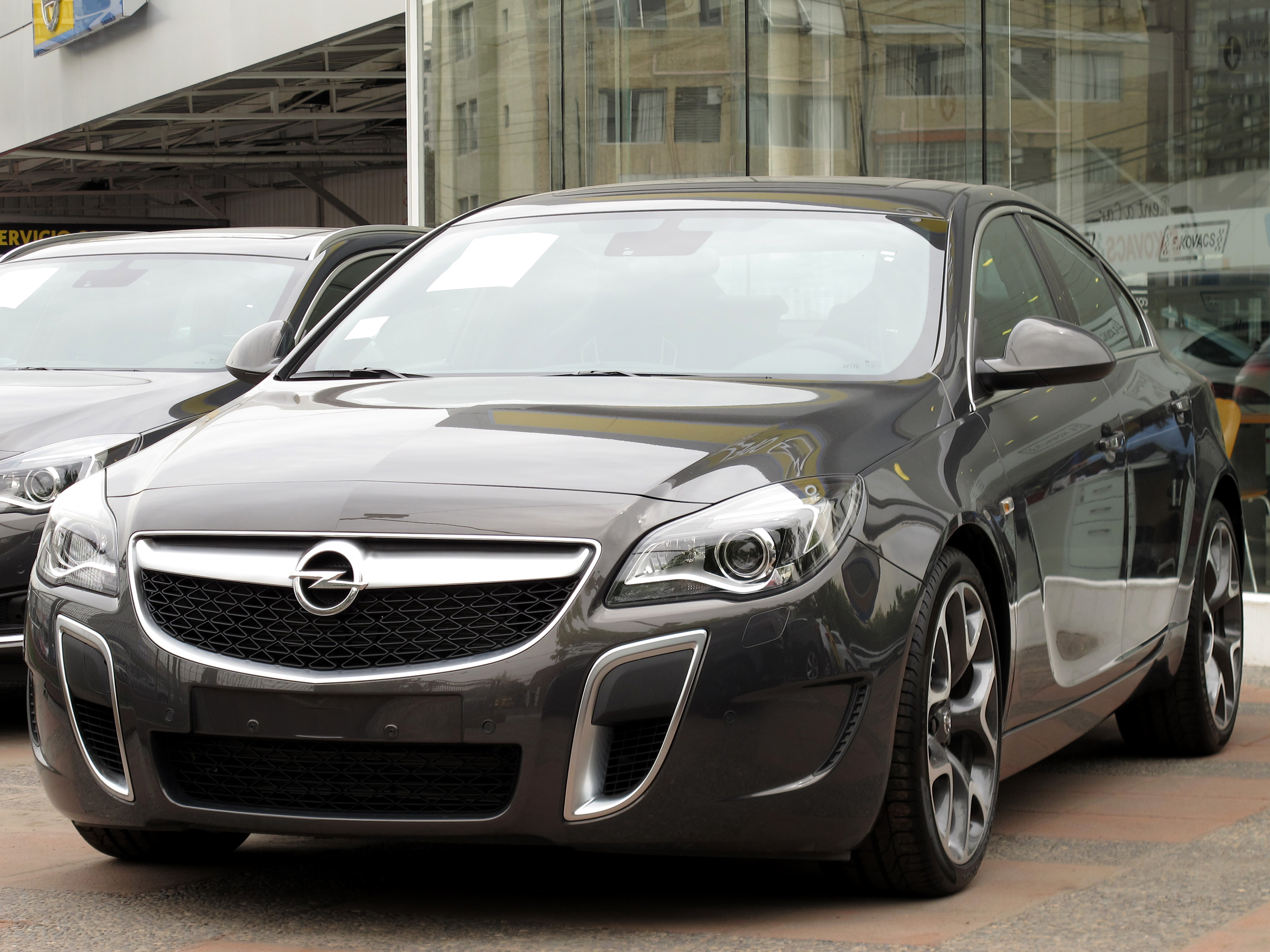 Opel Insignia OPC 2015